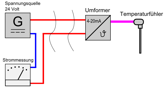 Beispiel einer 20mA-Schnittstelle mit einem PT100-Temperaturfühler und einer Analoganzeige.